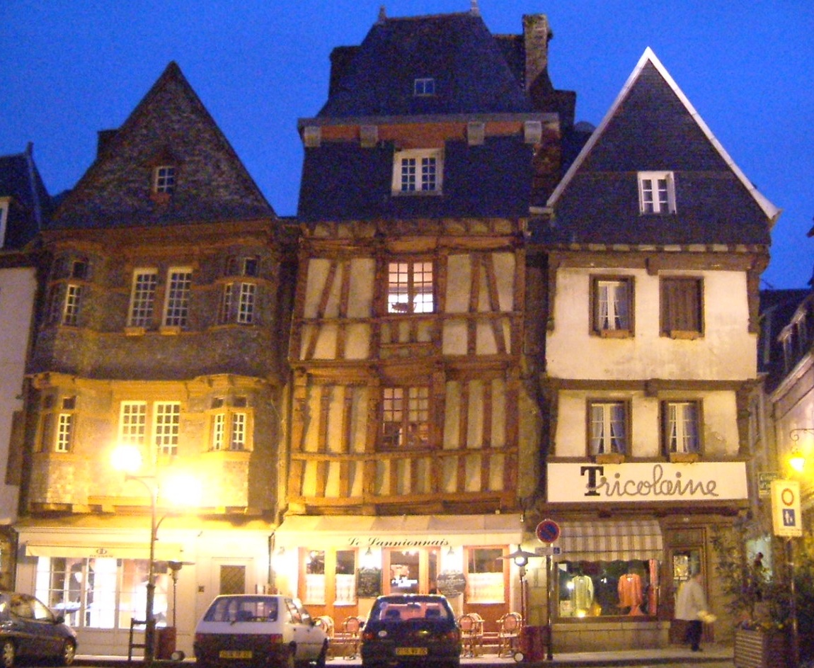 Centre ville historique de Lannion, maisons à colombage. Date : avril 2005, dans la soirée Auteur : Christophe.Finot